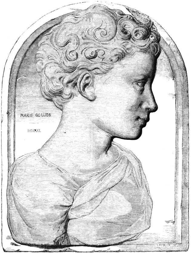 "Musée de la Renaissance, au Louvre. - Bas-relief attribué à Jean Goujon. - Dessin de Mettay."